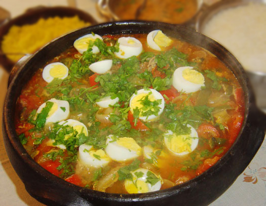 Moqueca Baiana, decorada com ovos cozidos